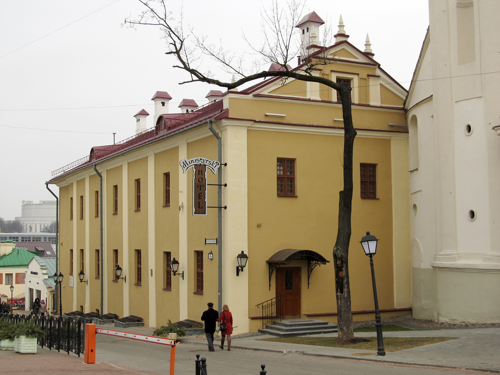 Мінск. Вуліца Кірыла і Мяфодзія, 6